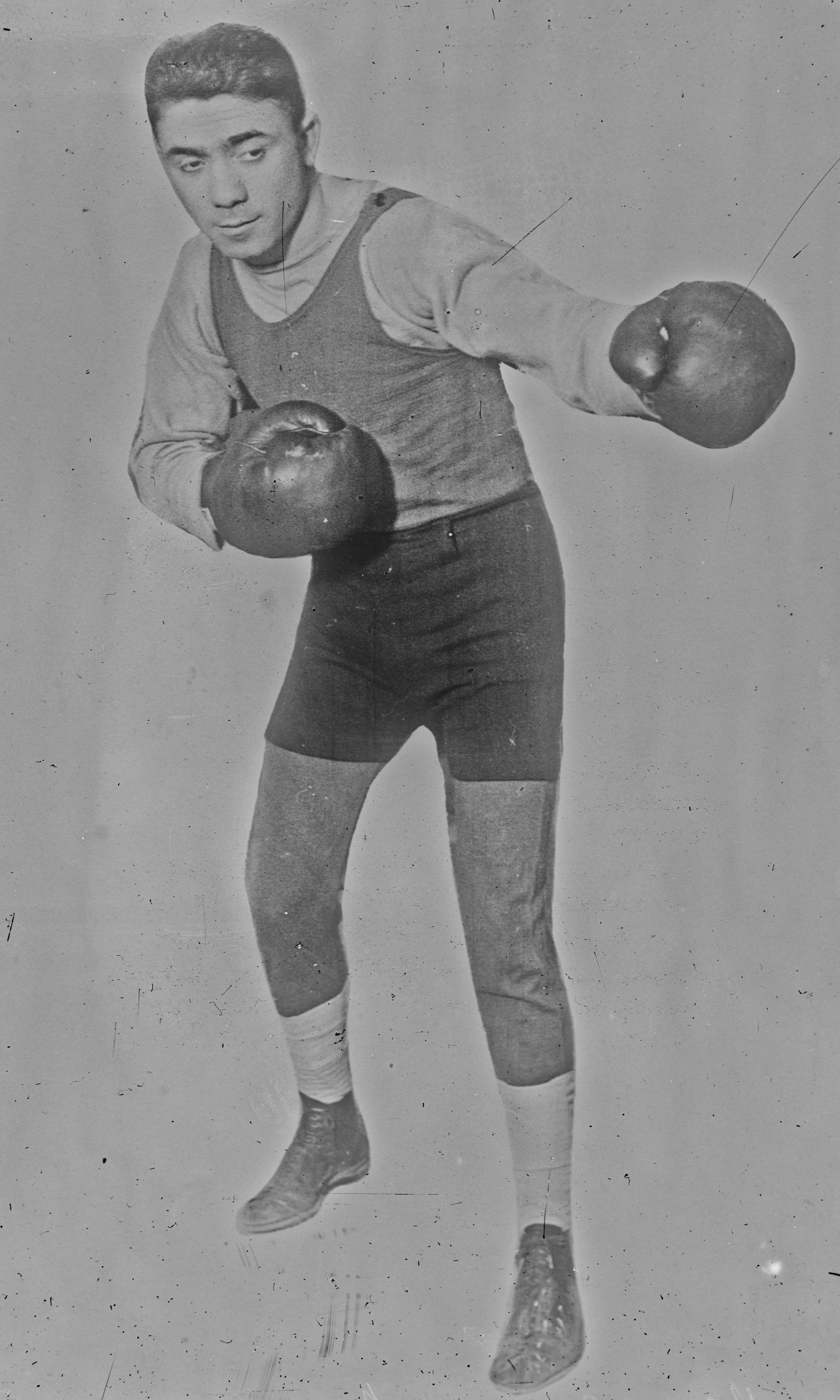 Portrait du boxeur américain Pete Herman.